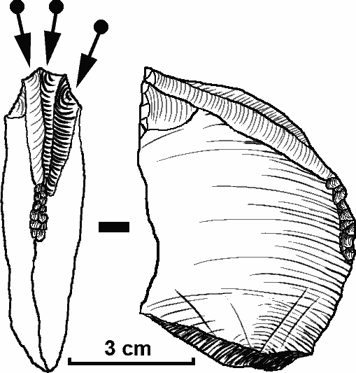 Buril carenado, suele ser típico del Auriñaciense - modelo no real